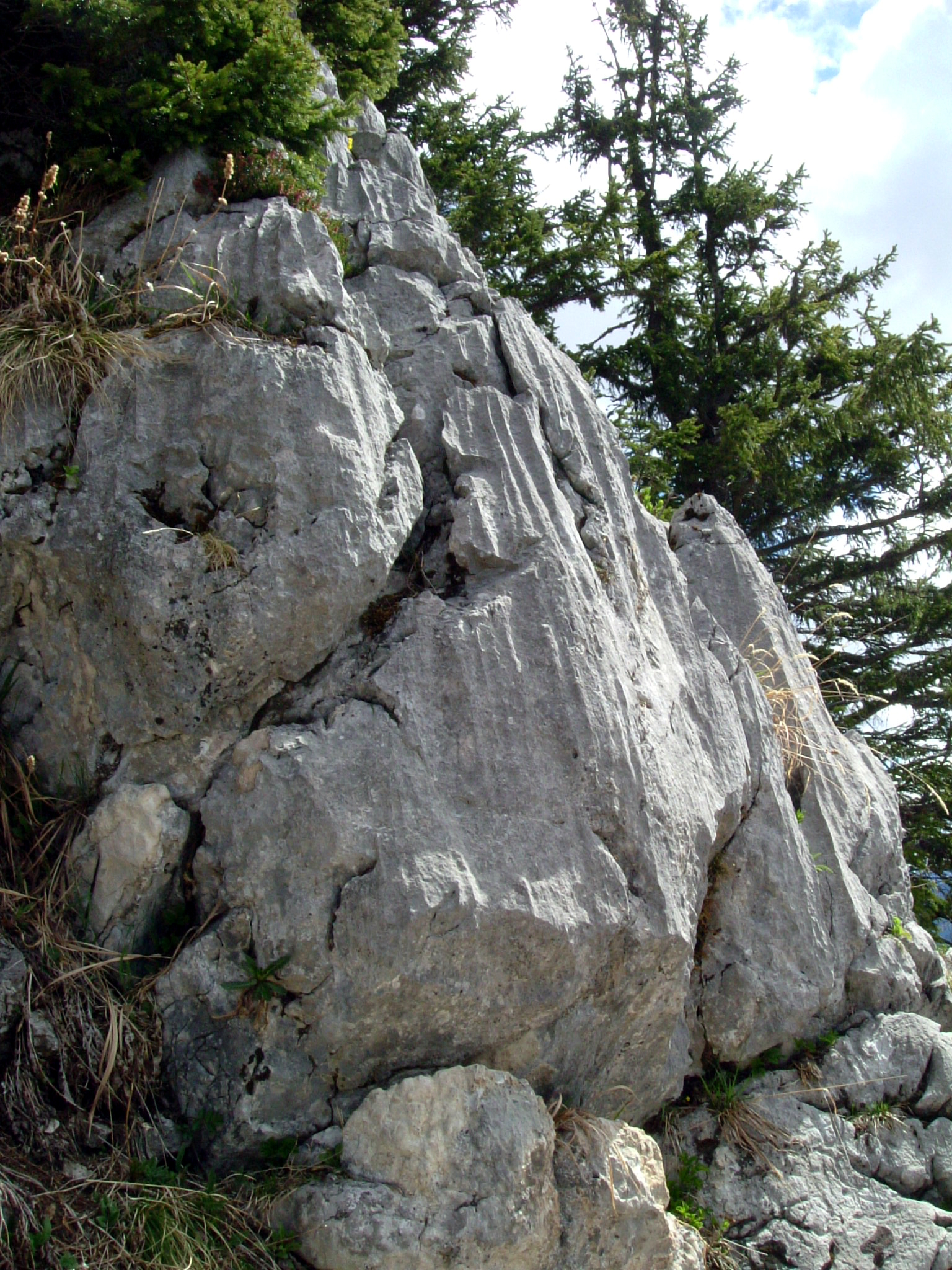 Jenner (Nationalpark Berchtesgaden): Karren im Dachsteinkalk